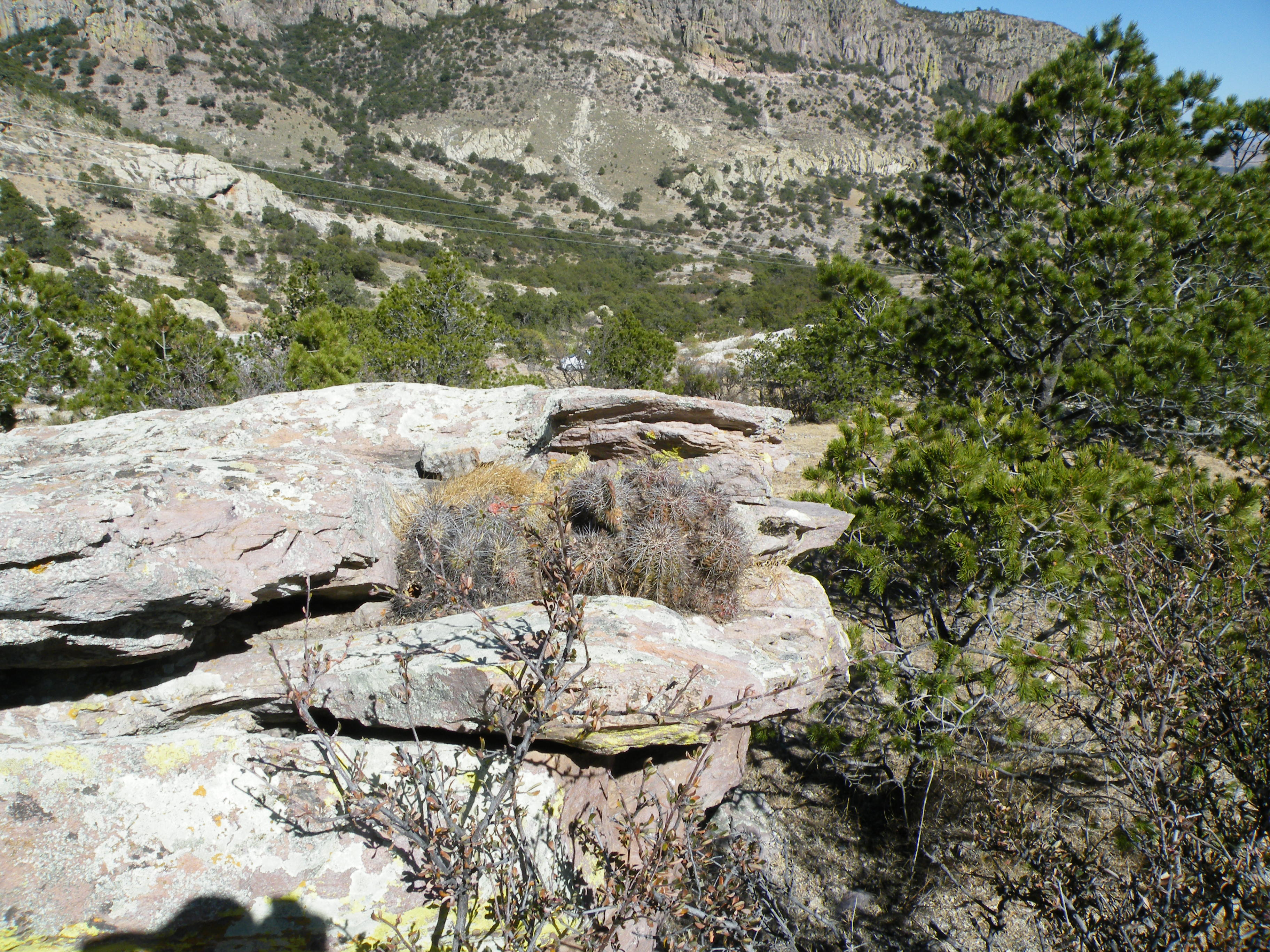 Coneto Pass, Durango